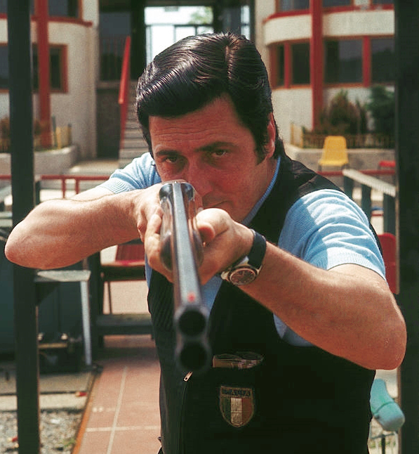 Silvano Basagni, 1972 Olympics.